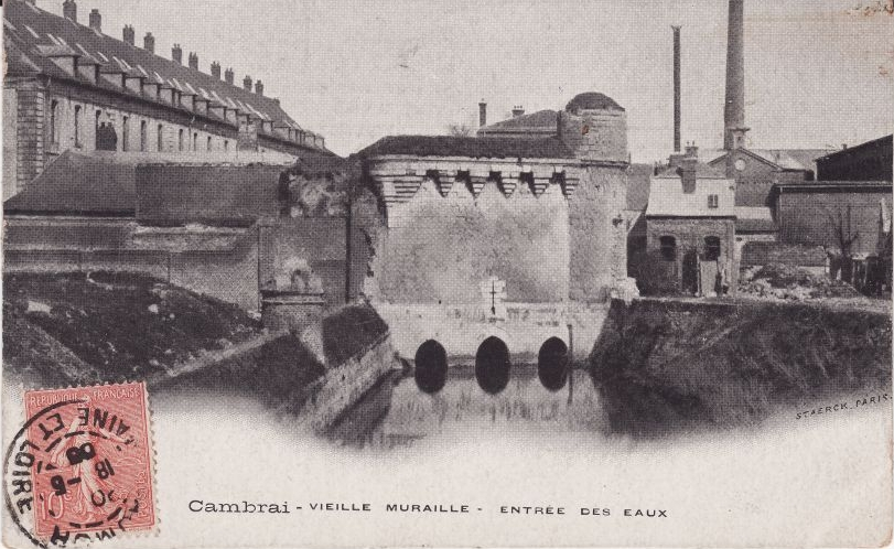 carte postale ancienne (début XXe siècle?) montrant la porte des Arquets et l'Escaut à Cambrai (Nord, France)